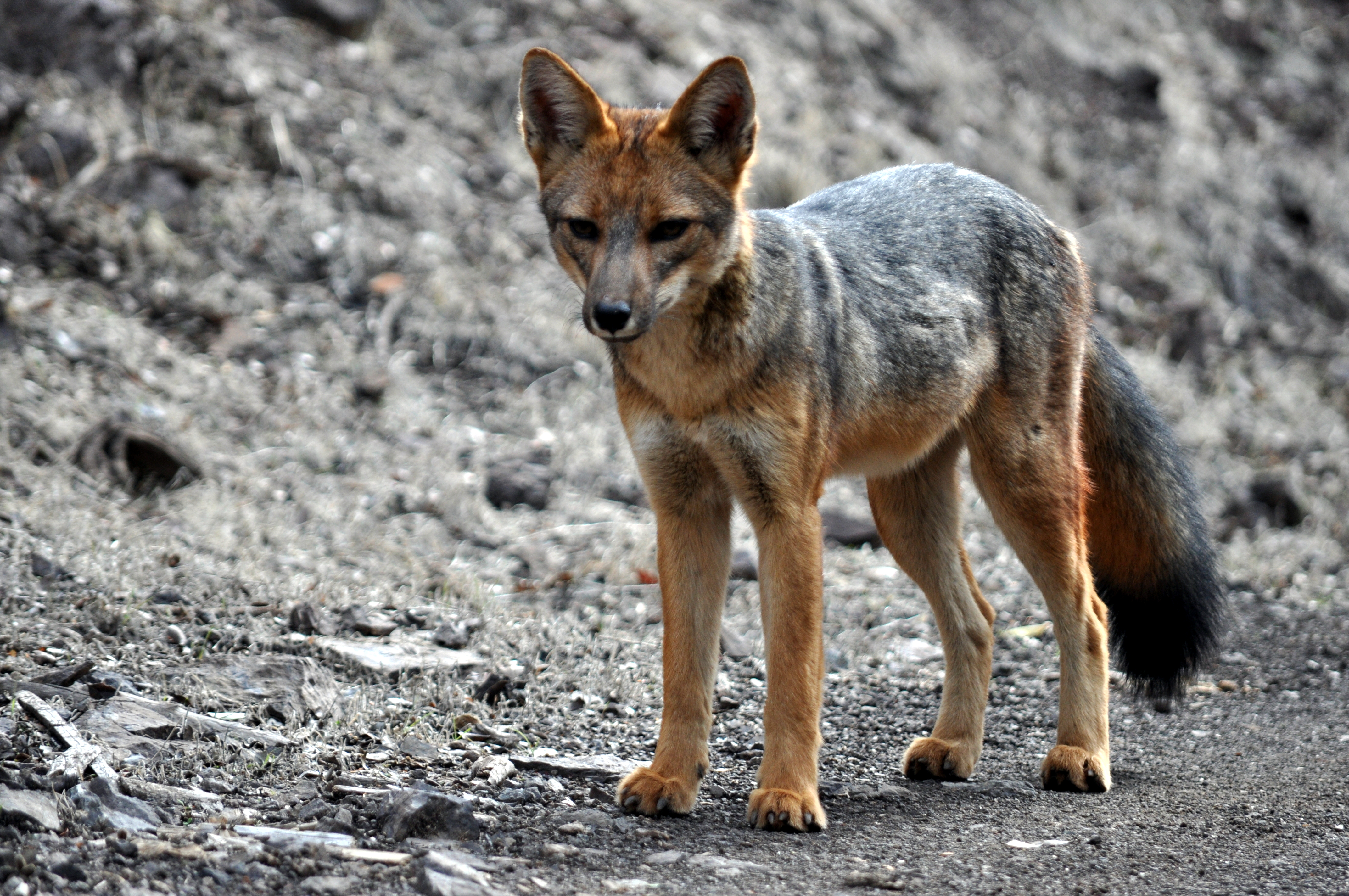 Lycalopex culpaeus culpaeus o Pseudalopex culpaeus culpaeus. Este ejemplar de zorro culpeo de Chile central fue fotografiado en la zona precordillerana de San Franciso de Los Andes, Chile ( a 1470 m s. n. m.)